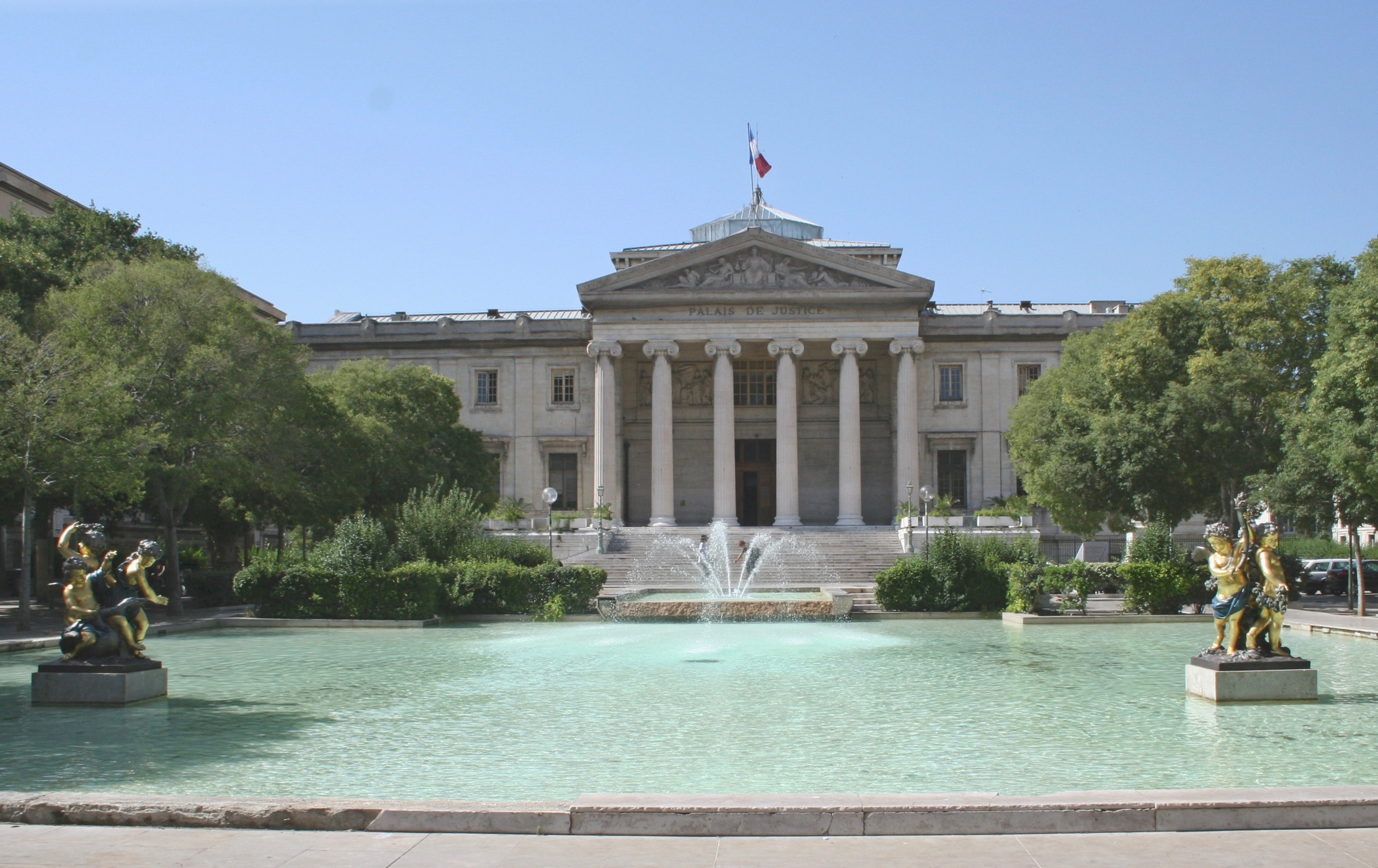 Palais de justice de Marseille inauguré le 4 novembre 1862.